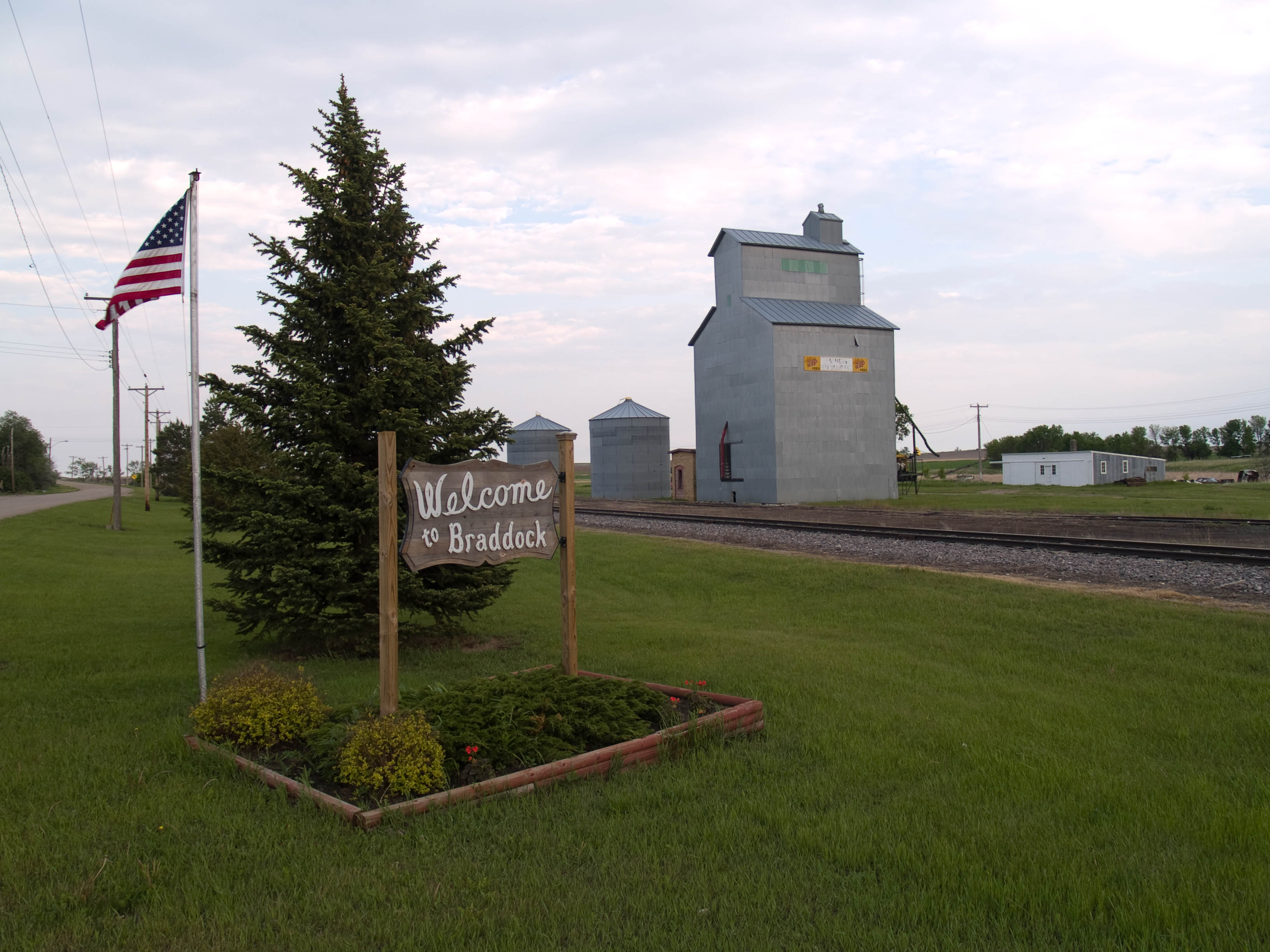 Braddock, North Dakota